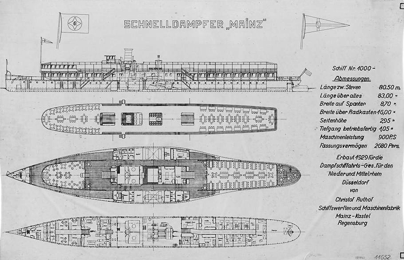 Generalplan des Schnelldampfers Mainz der Dampfschiffahrts-Gesellschaft für den Nieder- und Mittelrhein in Düsseldorf aus dem Jahre 1929